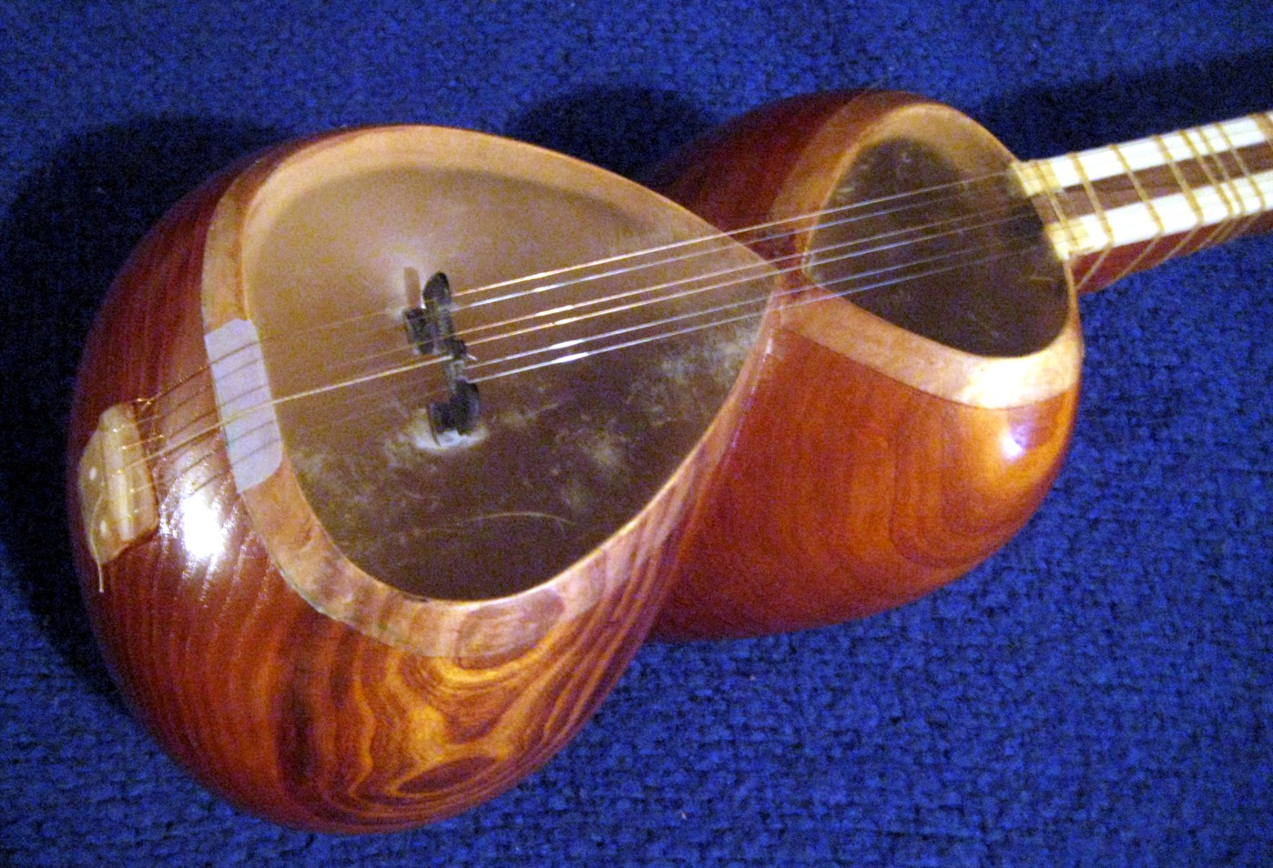 Tar